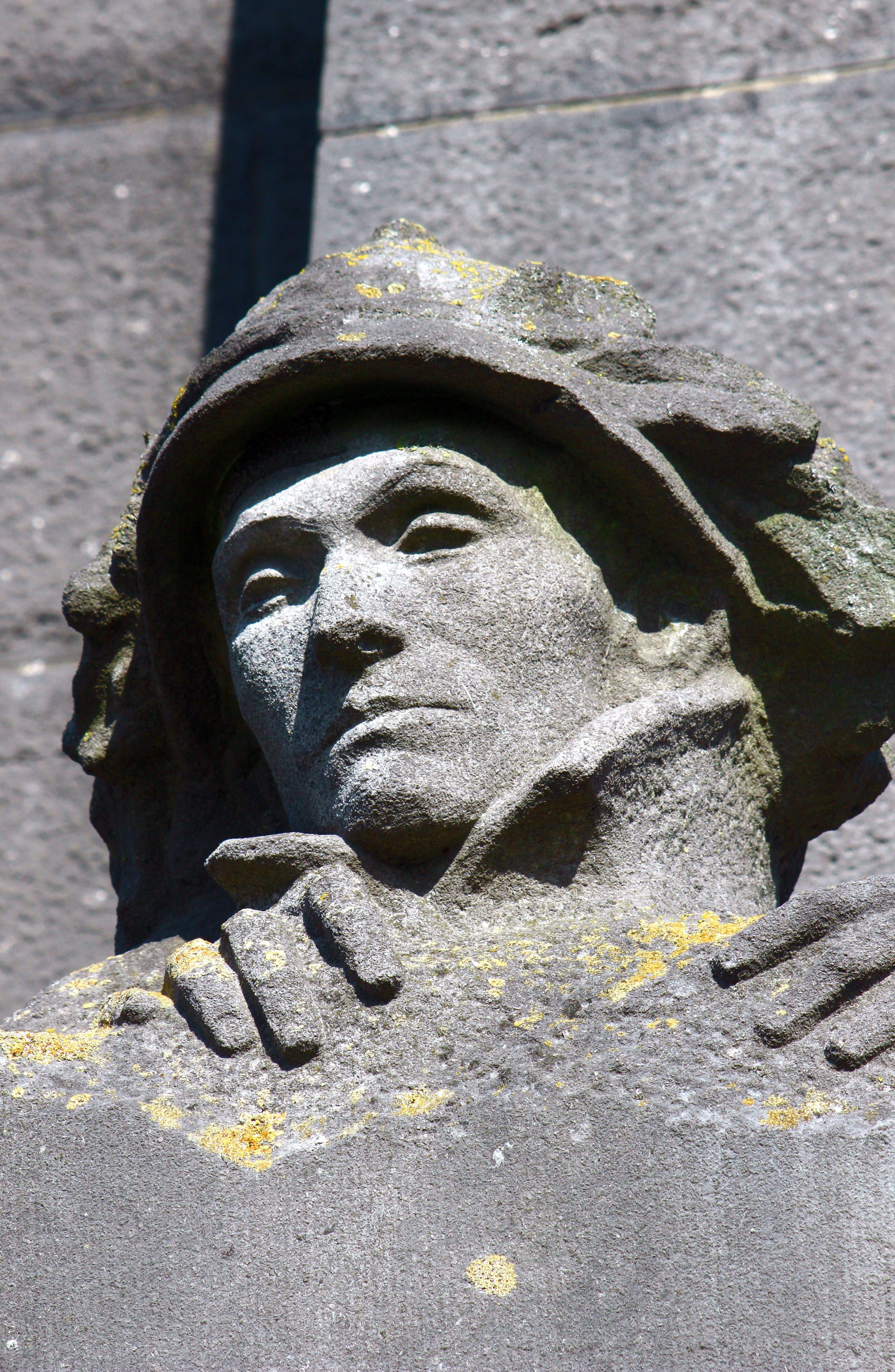 Mémorial de l'Yser (1930), Nieuport, Flandre occidentale, Belgique. Sculpteur : Pieter-Jan Braecke. Détail : un des quatre soldats représentant la résistance à l'ennemi